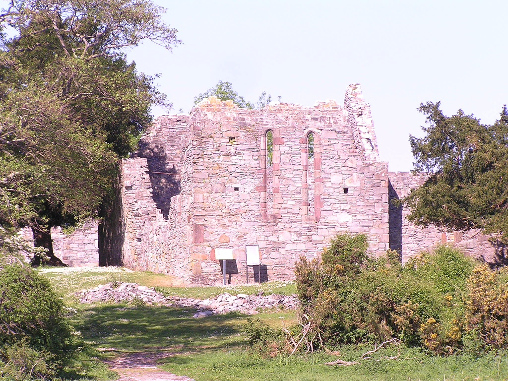 Photo taken May April 2007